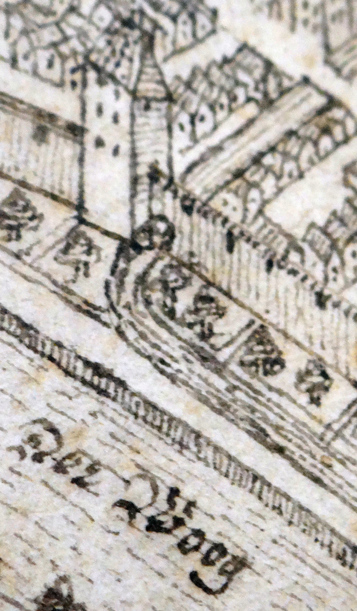 Bettelvogtturm und Eisbachauslass, Worms. Detail aus: Peter Hamman: Statt Wormbß wie selbige 1631 vor dem Schwedischen Ruin der Vorstätt [...] verblieben. Stadtarchiv Worms, Abt. 1B, Nr. 48.